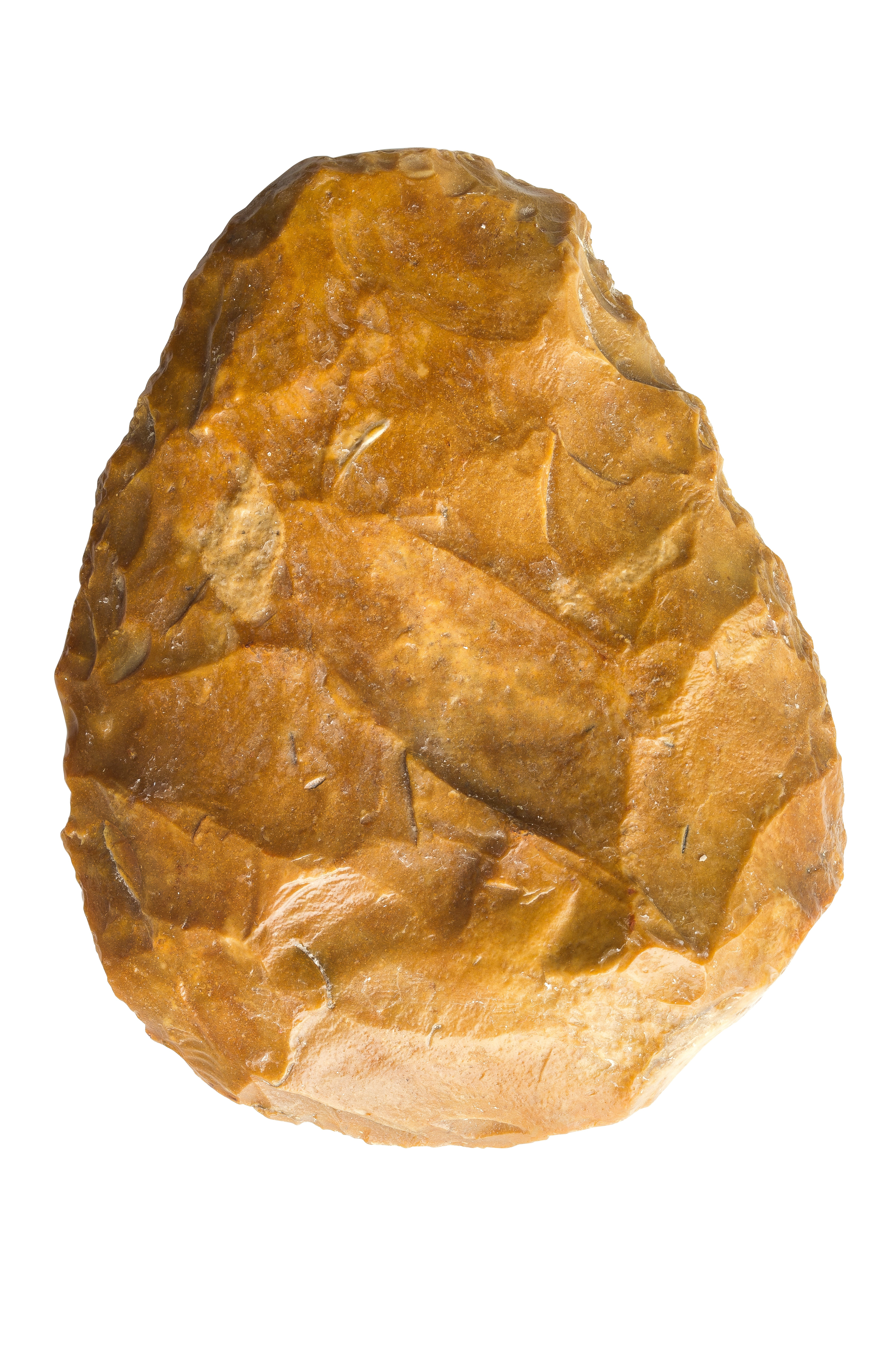 Vuistbijl in silex, 250 000 tot 38 000 BP, vindplaats: Meeuwen, In den Damp, 21.10.1985, 5°31'25" NB - 51°03'37" OL, collectie Gallo-Romeins Museum Tongeren, IDD 4